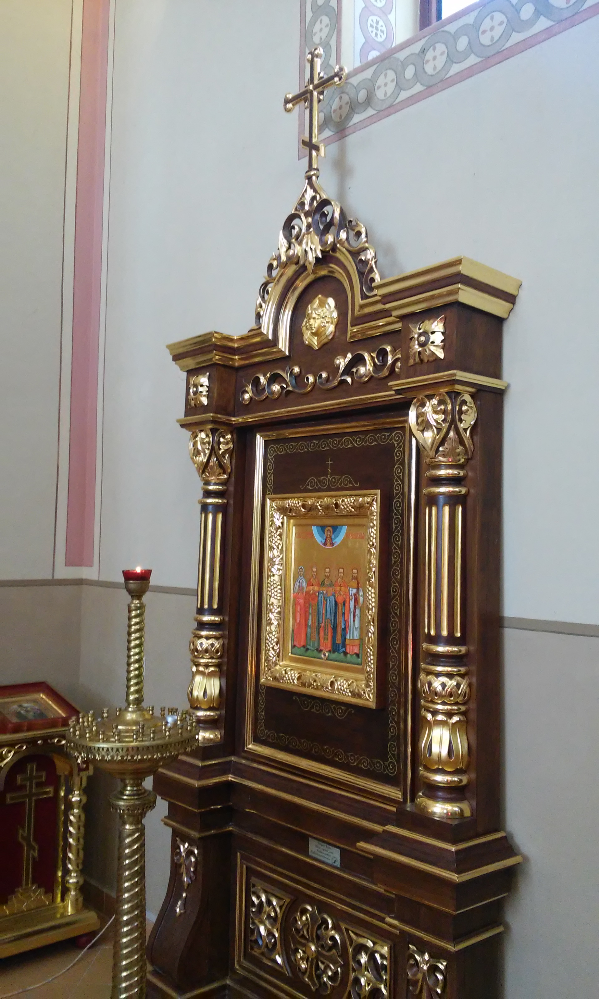 Ikona męczenników i wyznawców hrubieszowskich - ks. Sergiusza Zacharczuka, ks. Romana Medwida (Miedwiedia), ks. Bazylego Martysza, diakona Leoncjusza Strociuka i Kiry Oboleńskiej. Pochodzi z cerkwi w Hrubieszowie